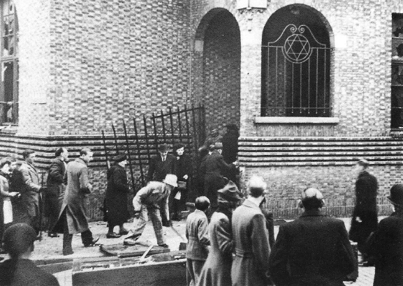 Image issue d'un film tourné par la propagande nazie à Anvers en 1941 tombée dans le domaine public